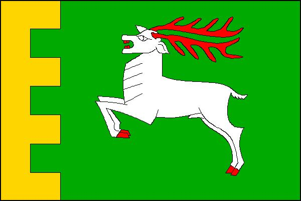 Vlajka obce Mrlínek